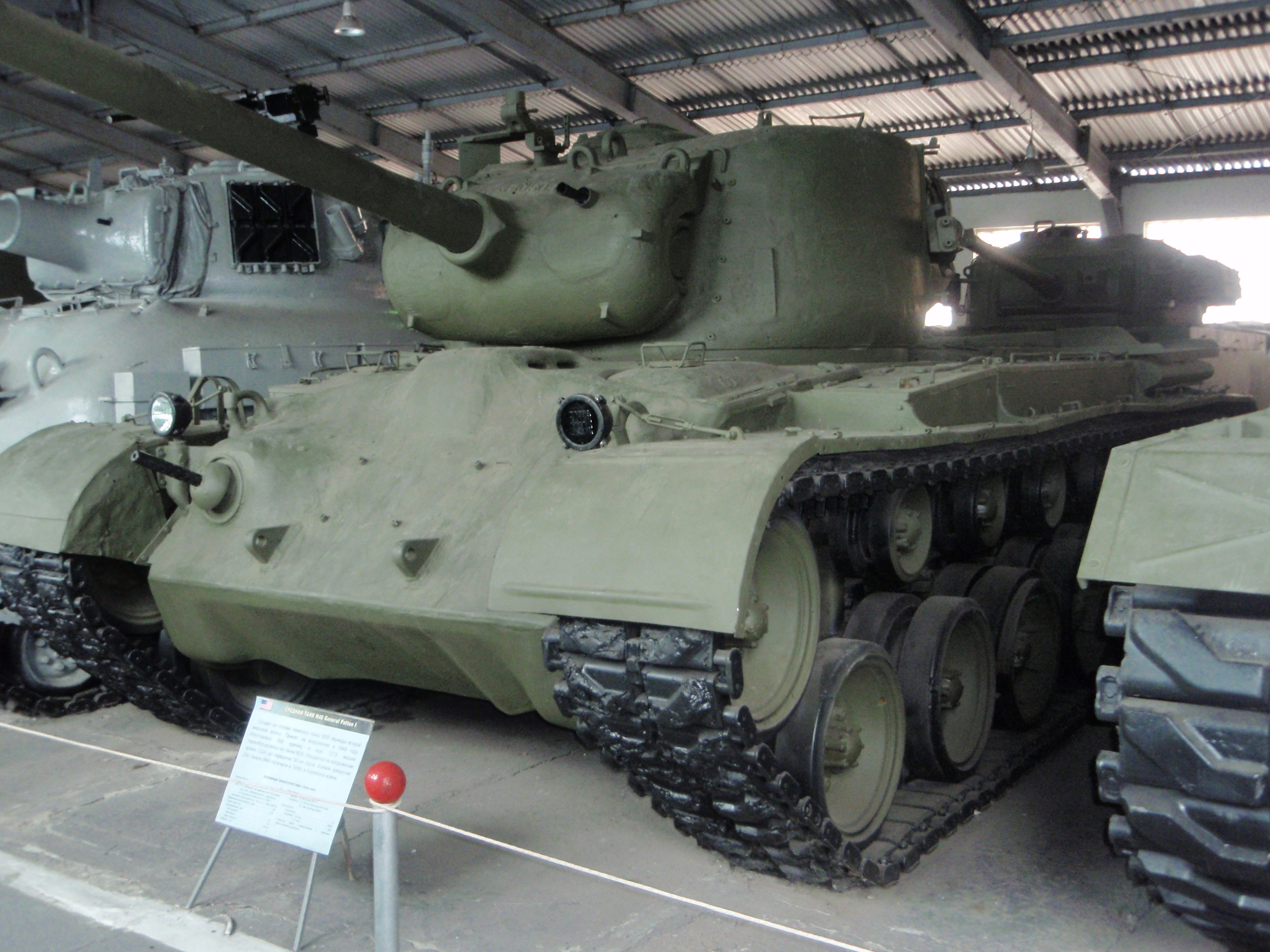 Американский средний танк M46 (General Patton I) в Кубинке